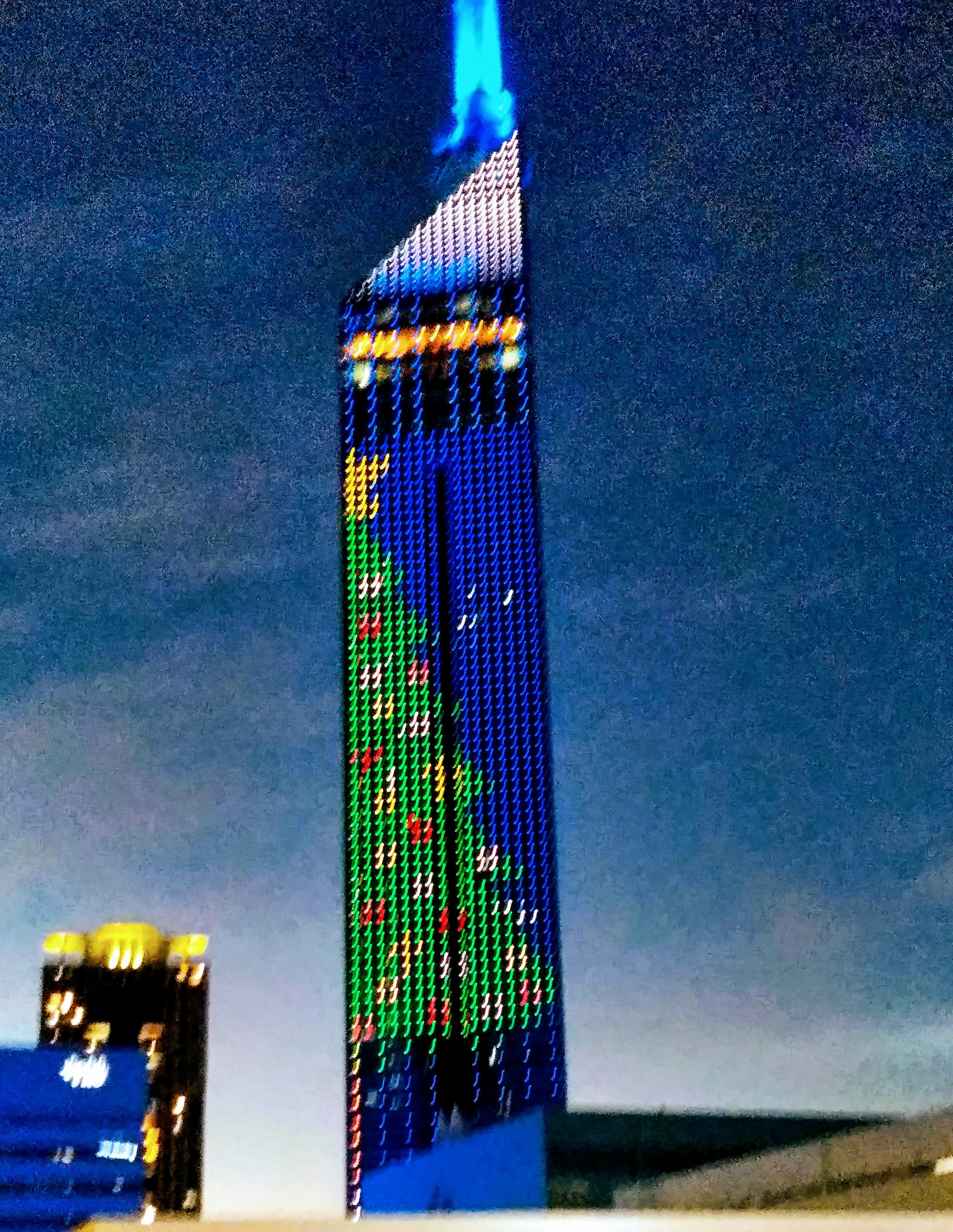 福岡タワーのクリスマスツリーのイルミネーション